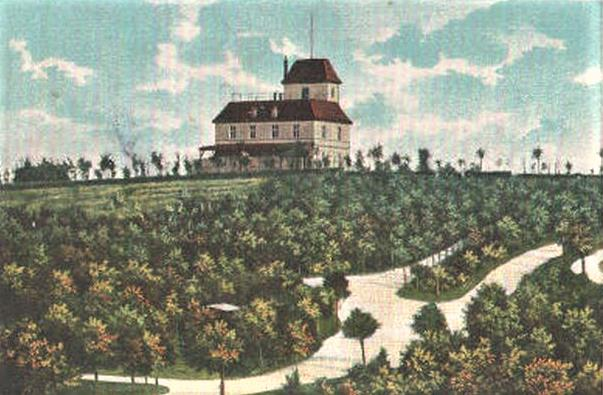 Restauracja Hopfenberg - Gaststätte, znajdująca się na szczycie Wzgórza Chmielowego, w chojnowskim Parku Piastowskim. Pocztówka z początku XX wieku.